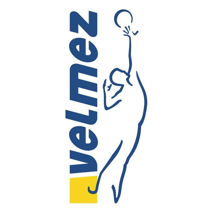 logo velmez volejbalu